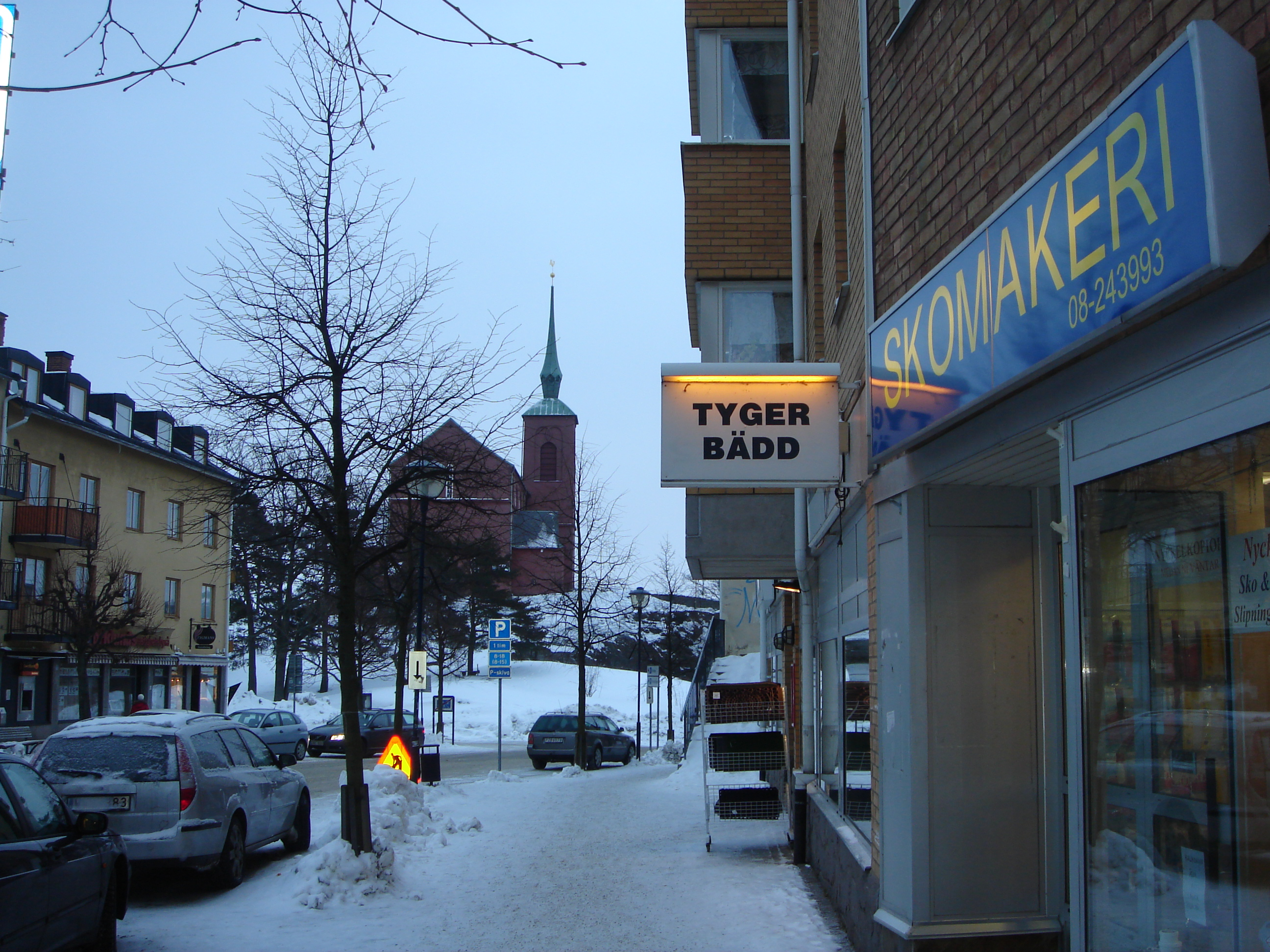 Nynäshamns kyrka